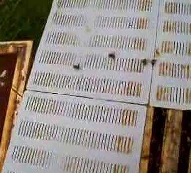 Trampa para propóleos colocada